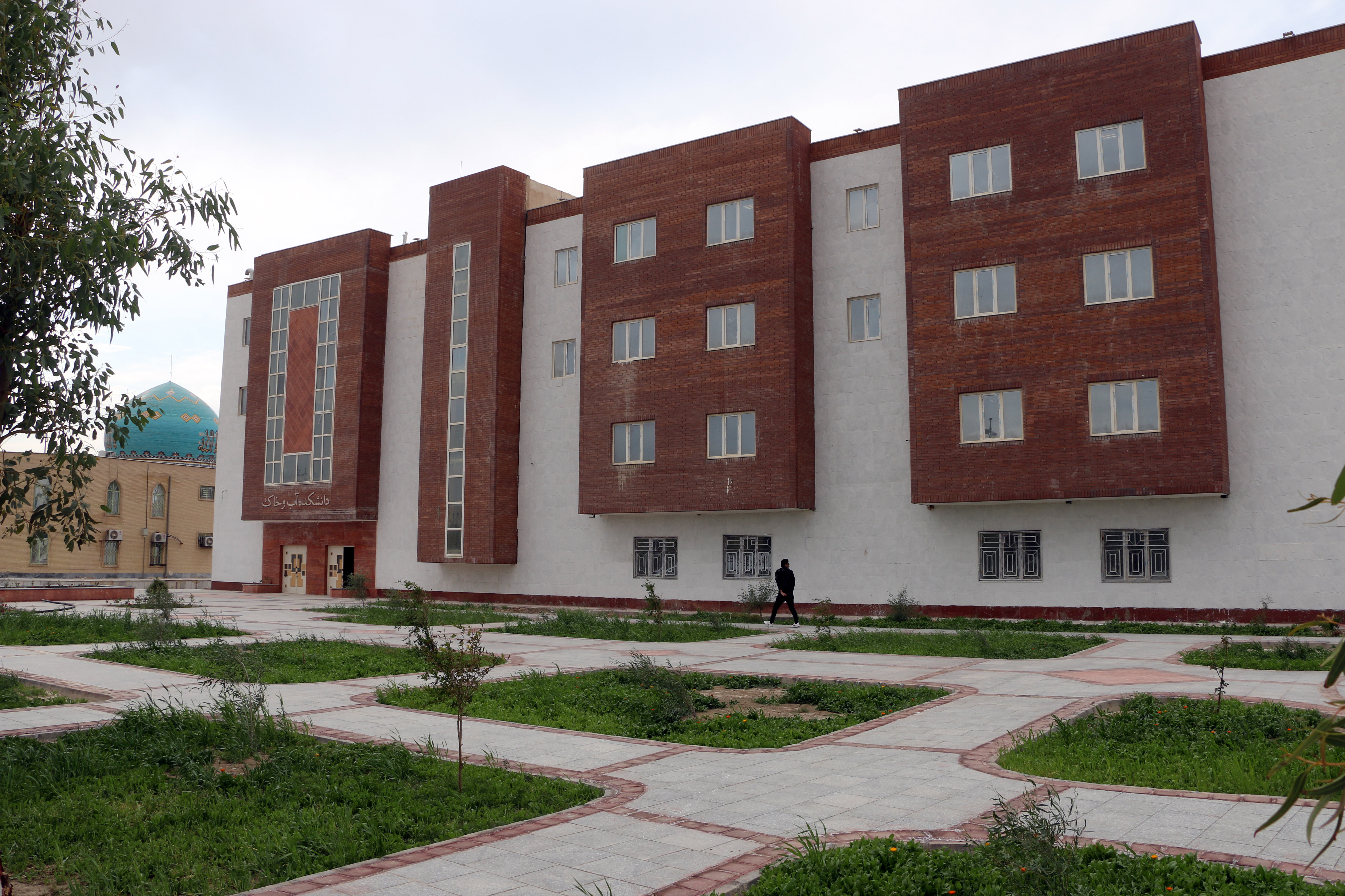 نمای دانشکده آب و خاک